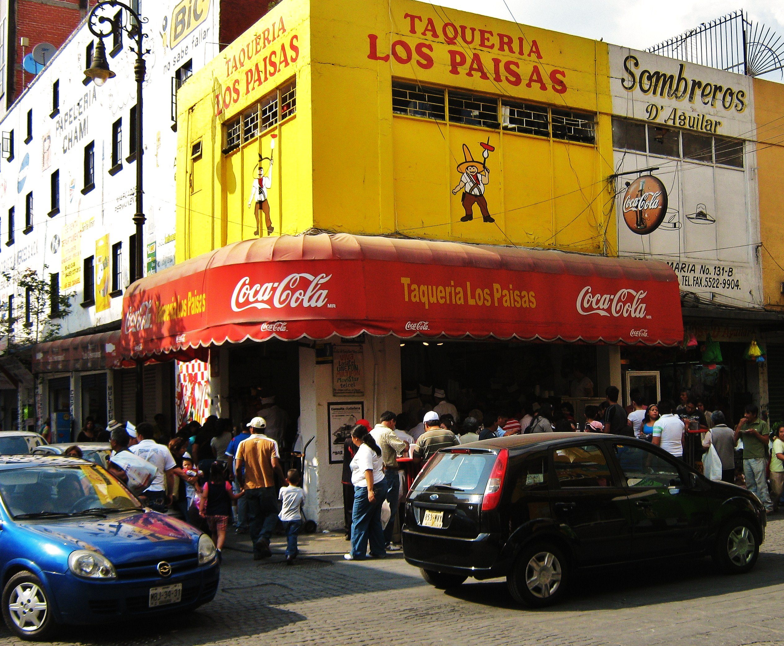 Taqueria los Paisas